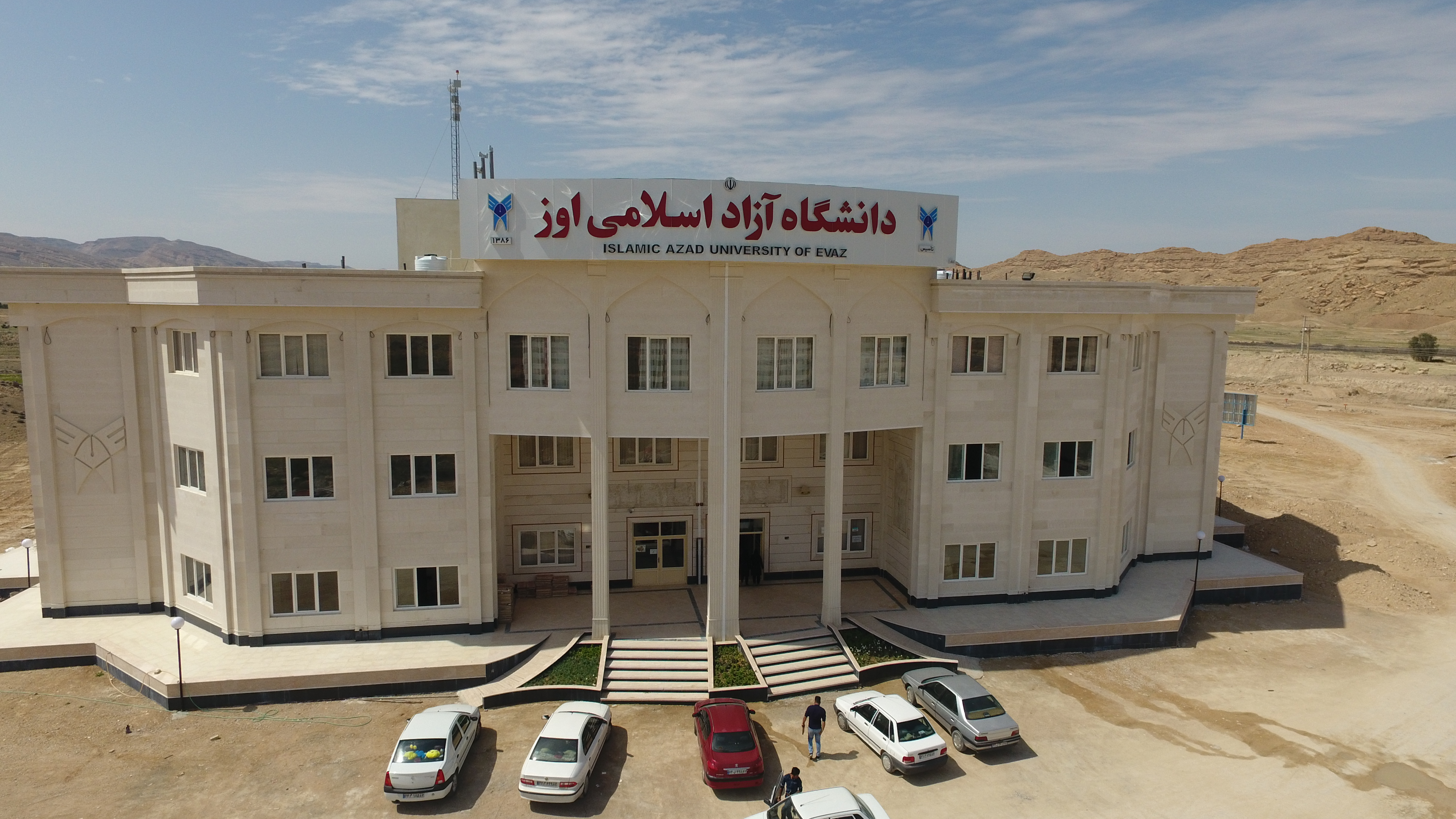 سال تاسیس1386